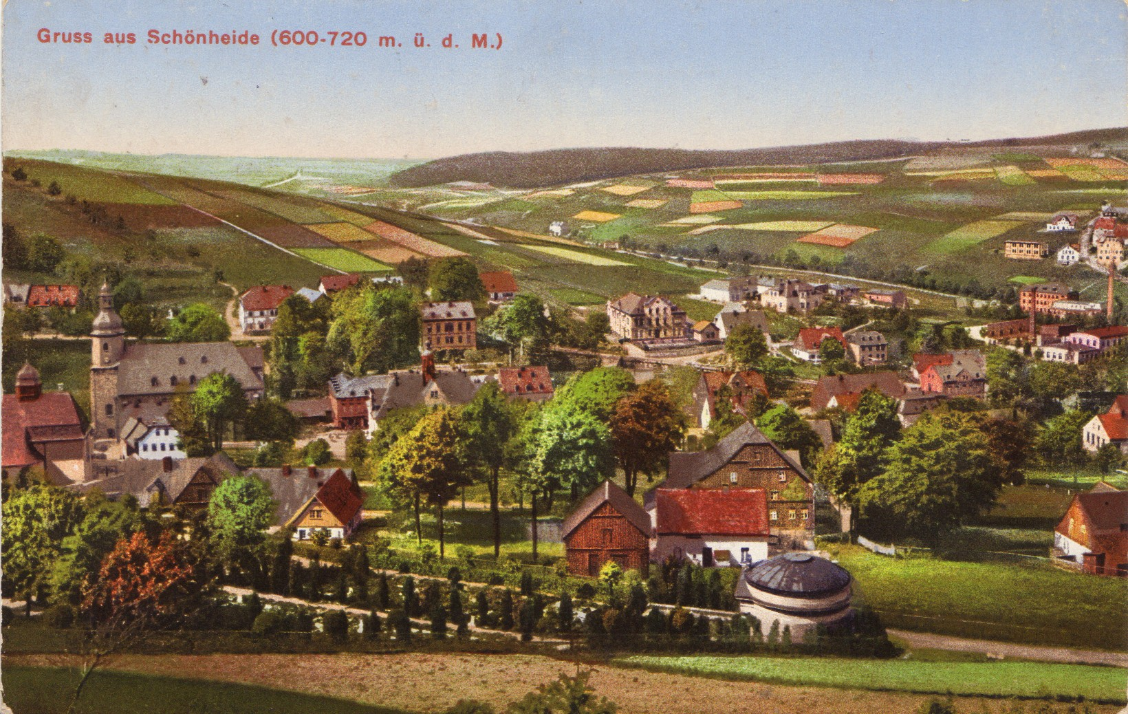 Schönheide im Erzgebirge: Unterer Teil vom Berg Knock aus gesehen in Richtung Norden. Im Hintergrund Stützengrüns Ortsteil Neulehn, rechts im Hintergrund Schönheides Ortsteil Webersberg. Am linken Rand die Friedhofskapelle von 1910 (mit Dachreiter), dann die Martin-Luther-Kirche, östlich davon das 1882 entstandene Rathaus im Stil der Neorenaissance. Im Vordergrund der Alte Friedhof Schönheide, rechts an dessen Ende die Rotunde des Querfurth-Mausoleums. Ziemlich in der Mitte der Karte im Mittelgrund die Methodisten-Kirche, früher Immanuel-Kapelle genannt. Rechts oben der Ortsteil Webersberg (Teilansicht).